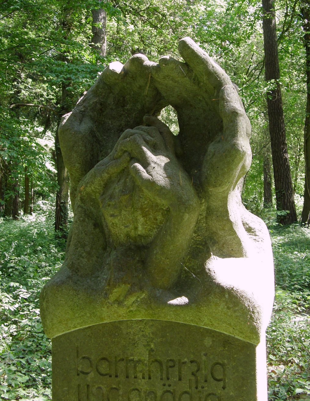 Wilmersdorfer Waldfriedhof Stahnsdorf; Grabskulptur von Walter Schulze-Mittendorff